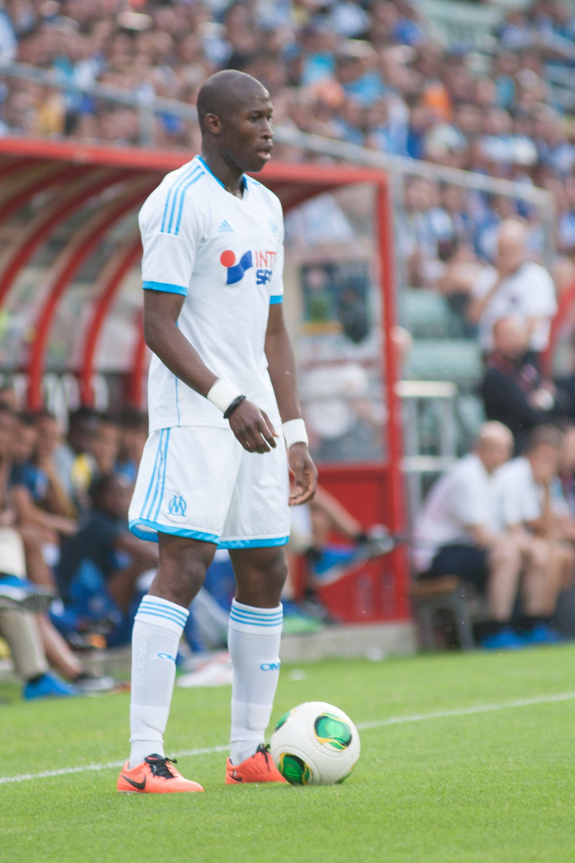 OM - FC Porto - Valais Cup 2013 - Marseillais 3